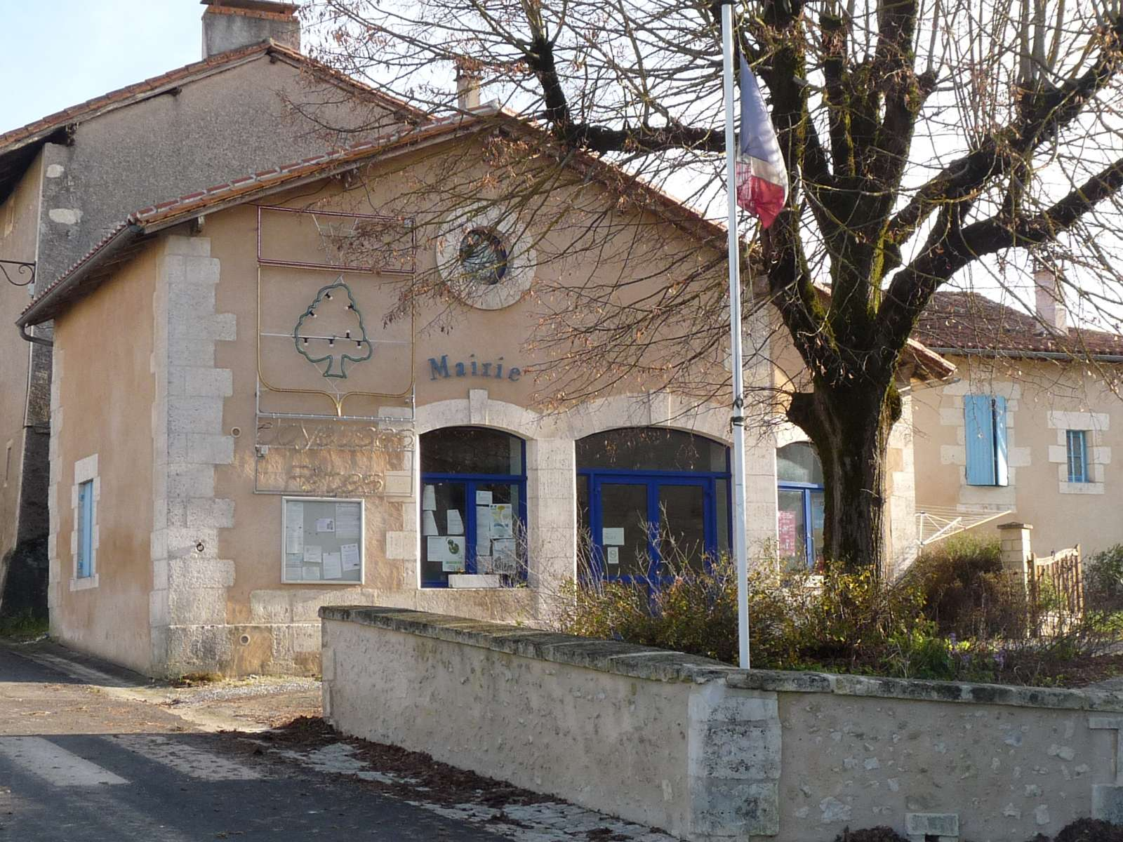 mairie de Chassaignes, Dordogne, France